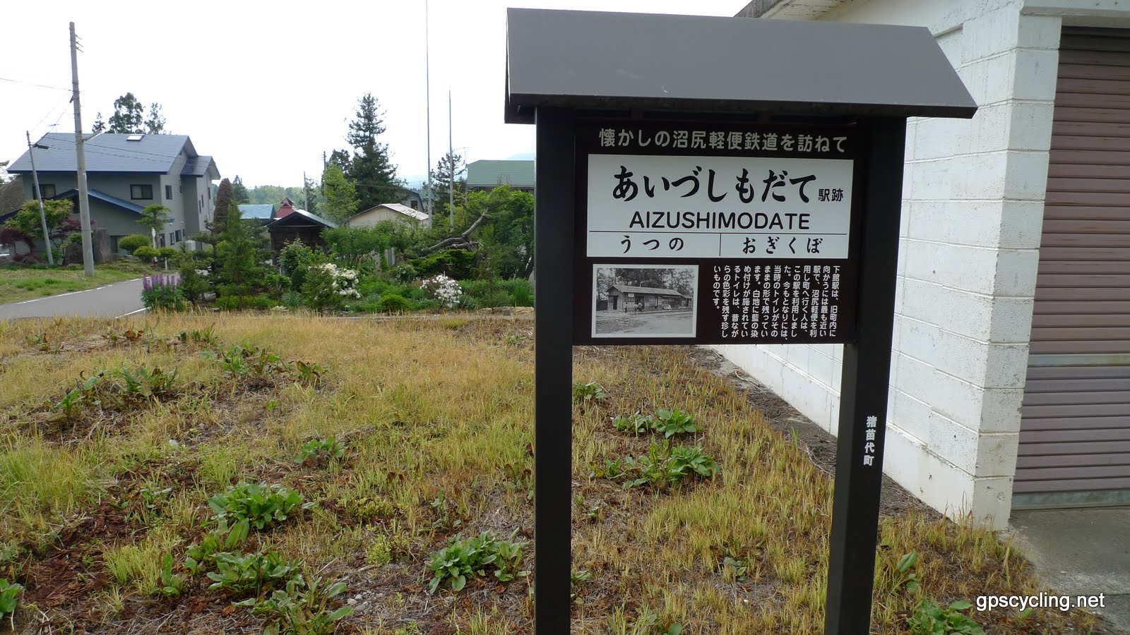 沼尻軽便鉄道会津下館駅跡